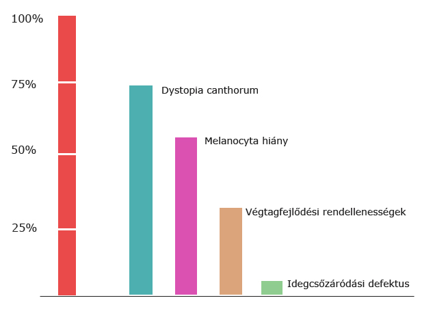 WS-szindróma - oszlopdiagram